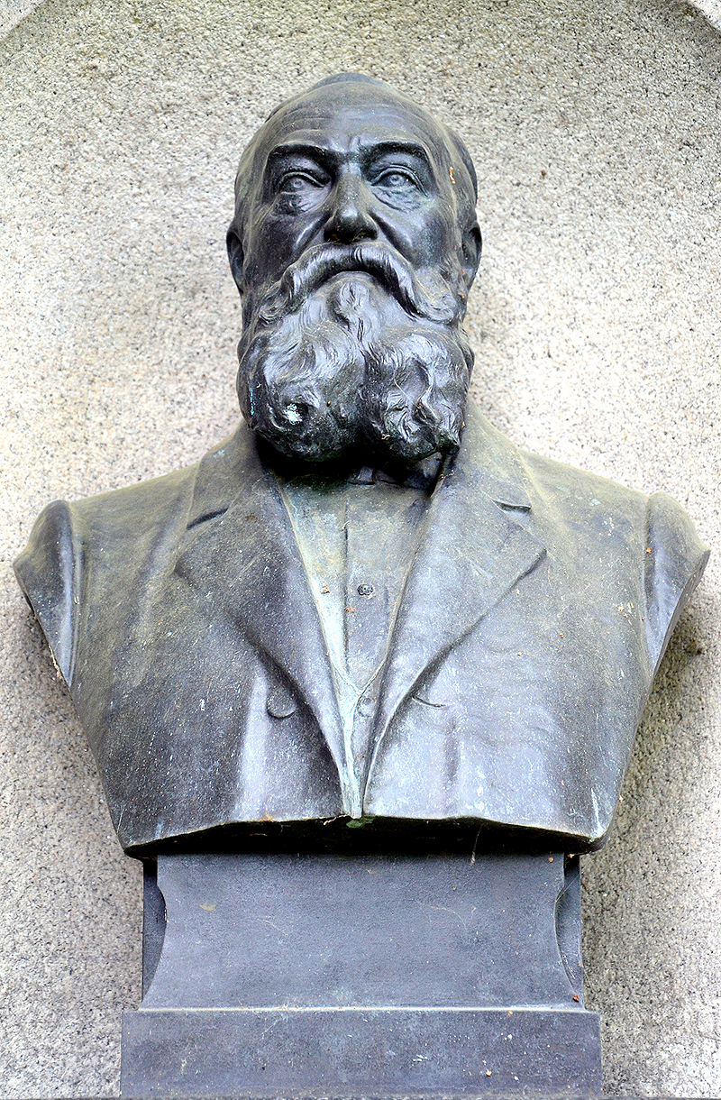 Auf dem Stadtfriedhof Engesohde in Hannover findet sich in der Wand des Familiengrabes die Büste des Maschinenfabrikanten und Politikers Albert Knoevenagel aus der Berliner Werkstatt der von Hermann Gladenbeck begründten Aktien-Gesellschaft Gladenbeck ...